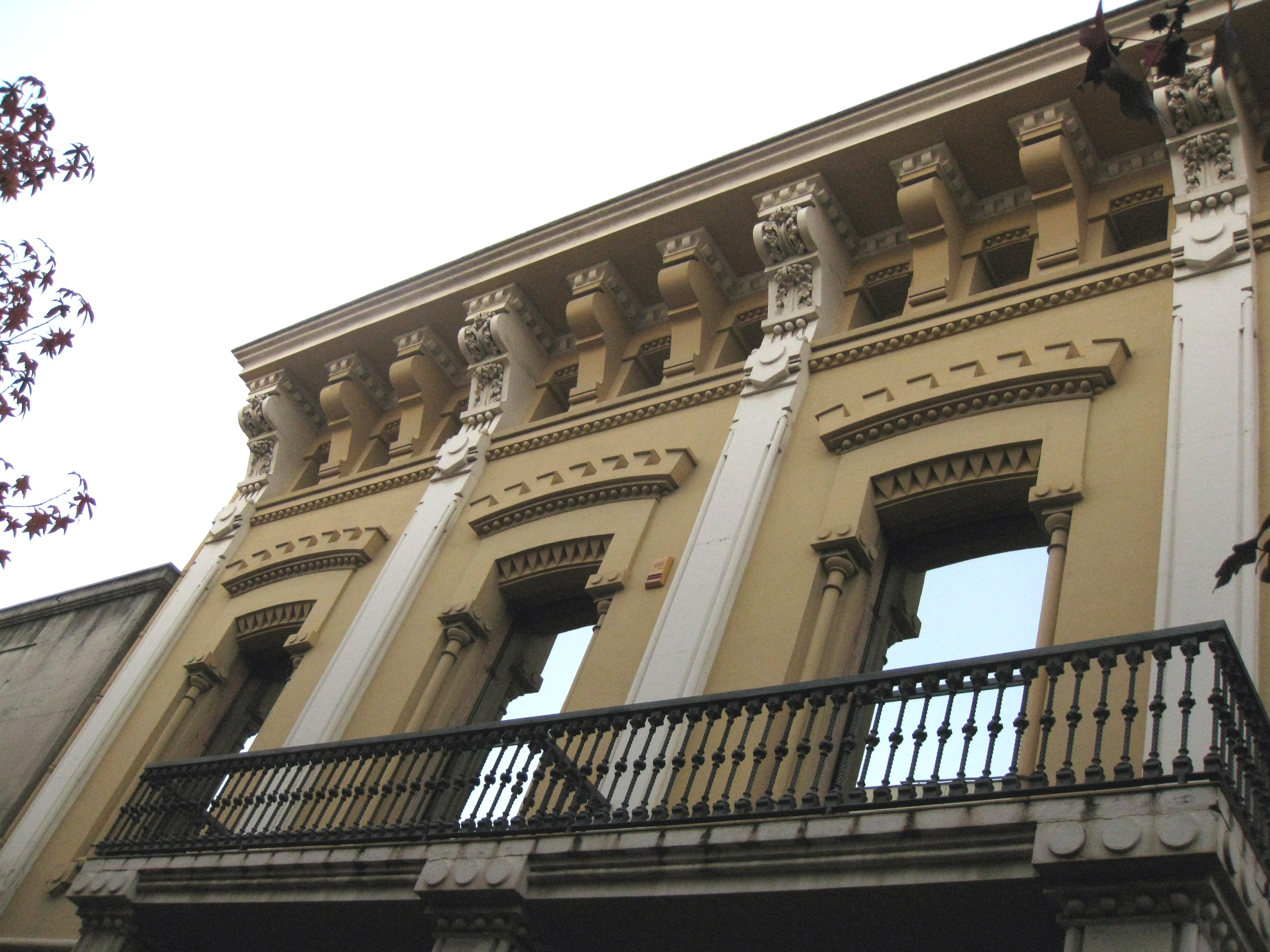 Magatzem Ventalló i Tusell, també conegut com a magatzem Alfons Sala, edifici de Lluís Muncunill de 1893 situat al carrer del Puig Novell núm. 14-16 (Terrassa). Detall del primer pis.